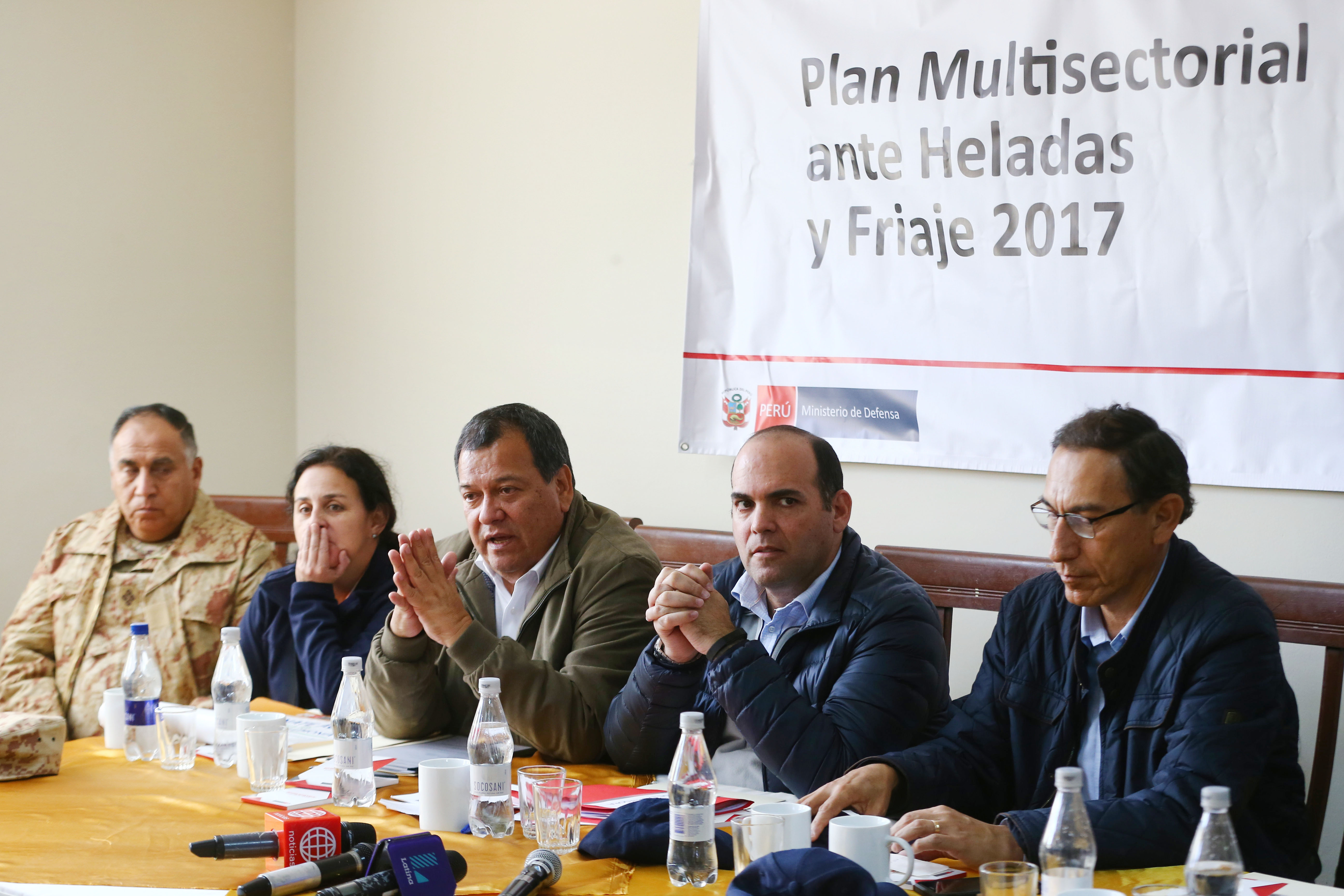 Vicepresidente de la República, jefe de gabinete ministerial y ministro de Defensa se reunieron con alcaldes de la provincia de Sánchez Cerro.